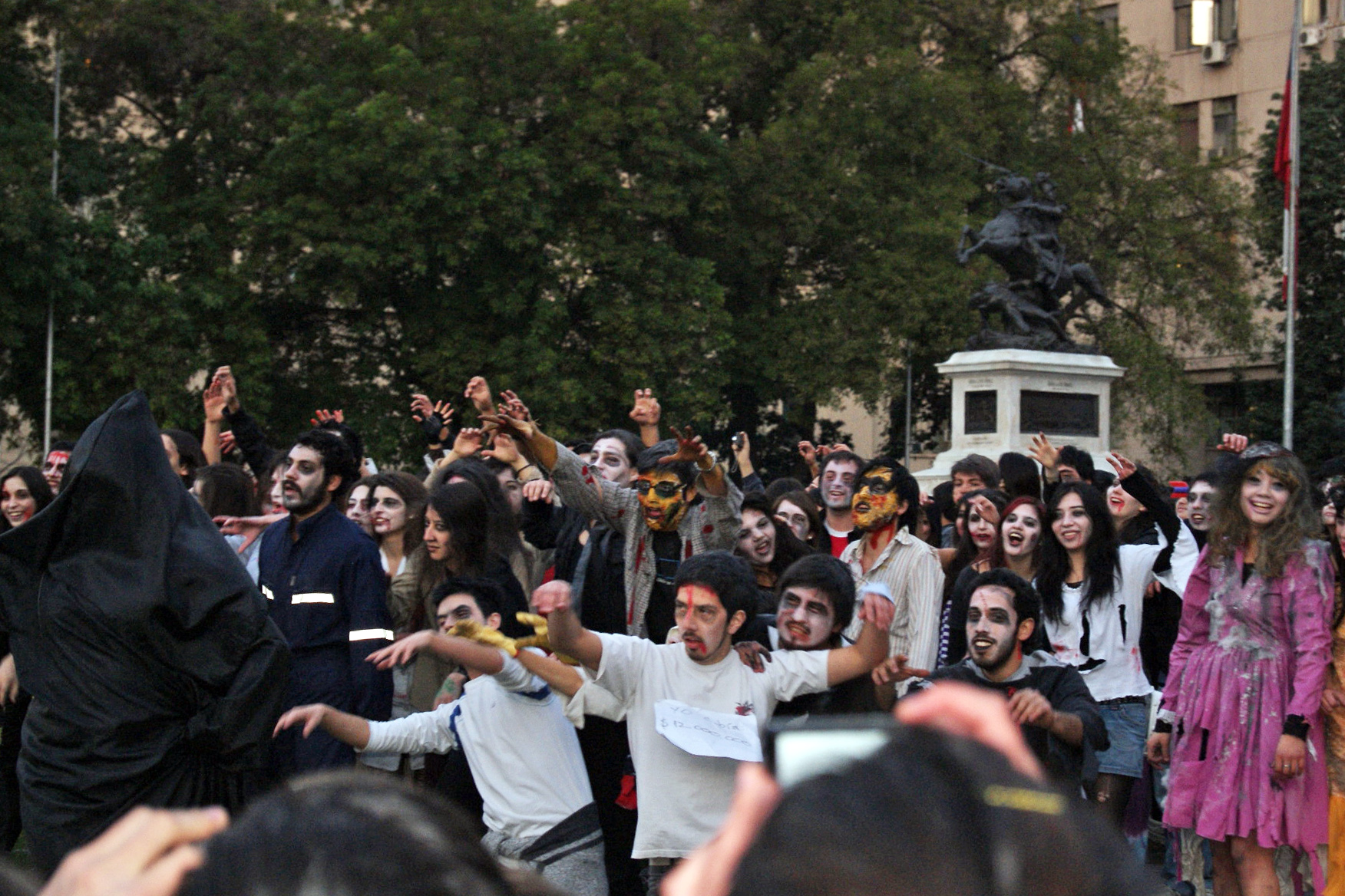 Estudiantes chilenos realizan un flashmob de Thriller en medio de las movilizaciones estudiantiles en Chile de 2011.